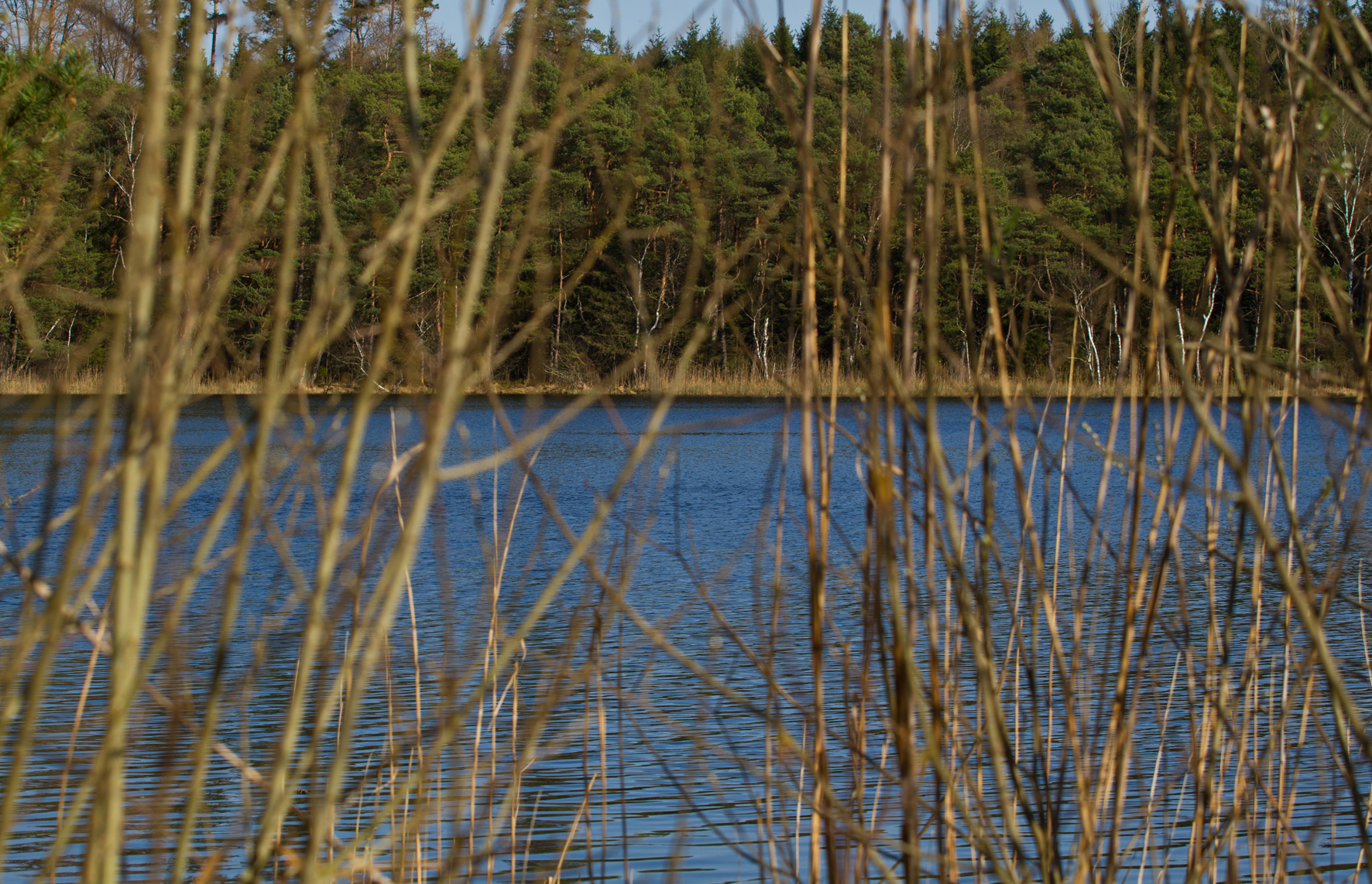 (LSG:BY-LSG-00164.01)_Schutz von Landschaftsteilen um den Staudhamer See in den Gemeinden Steppach, Soyen, Attel und Edling. Der Kesselsee ist ein Toteissee.